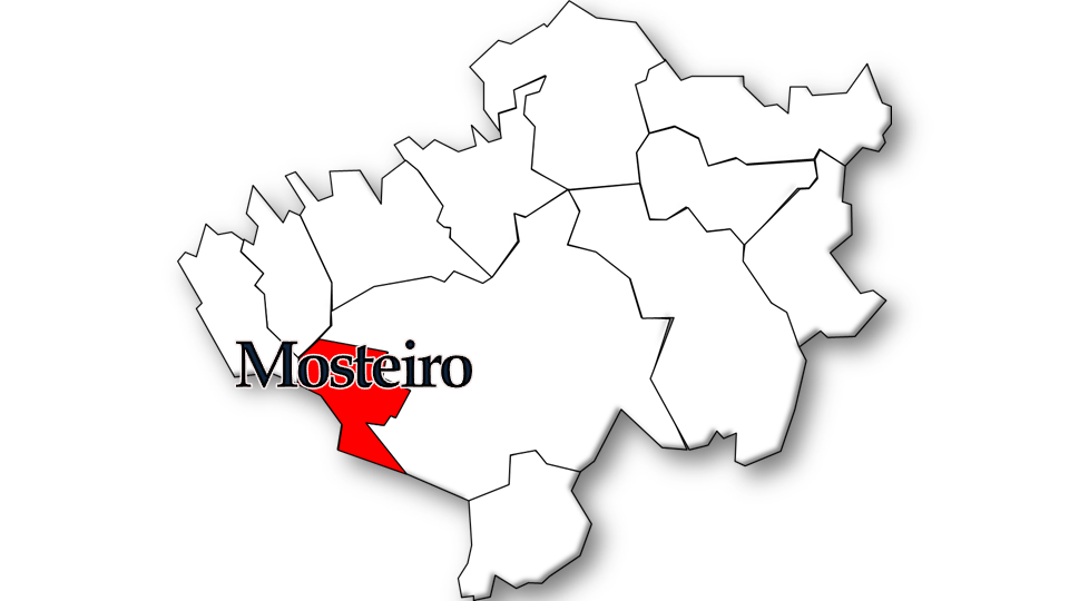 População